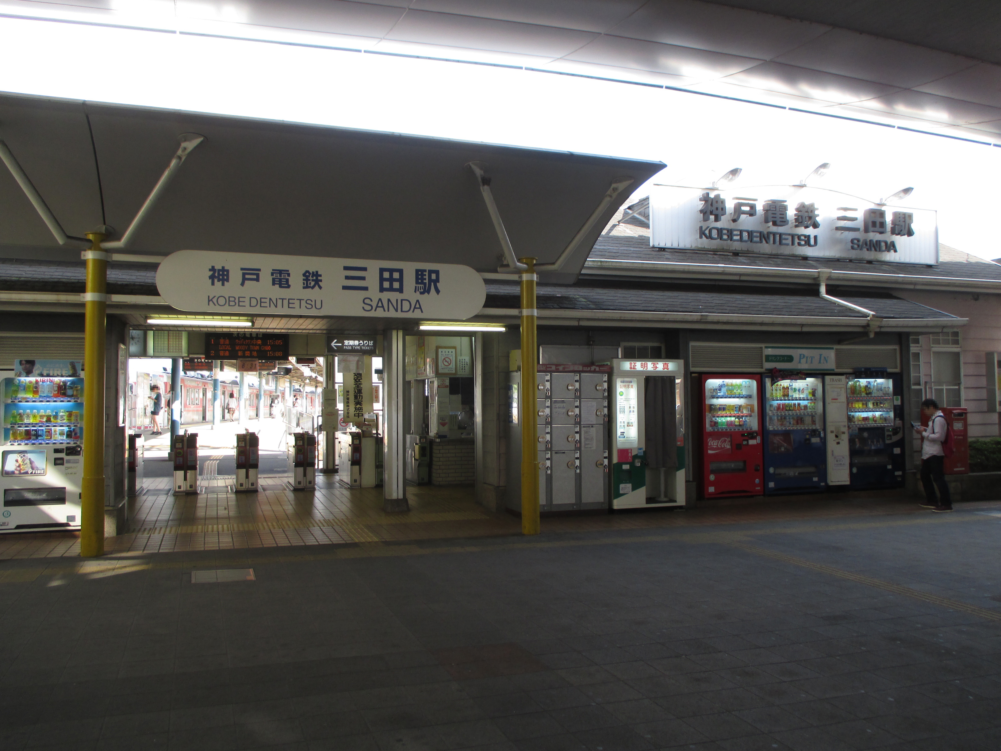 神戸電鉄 三田駅 Sanda Sta